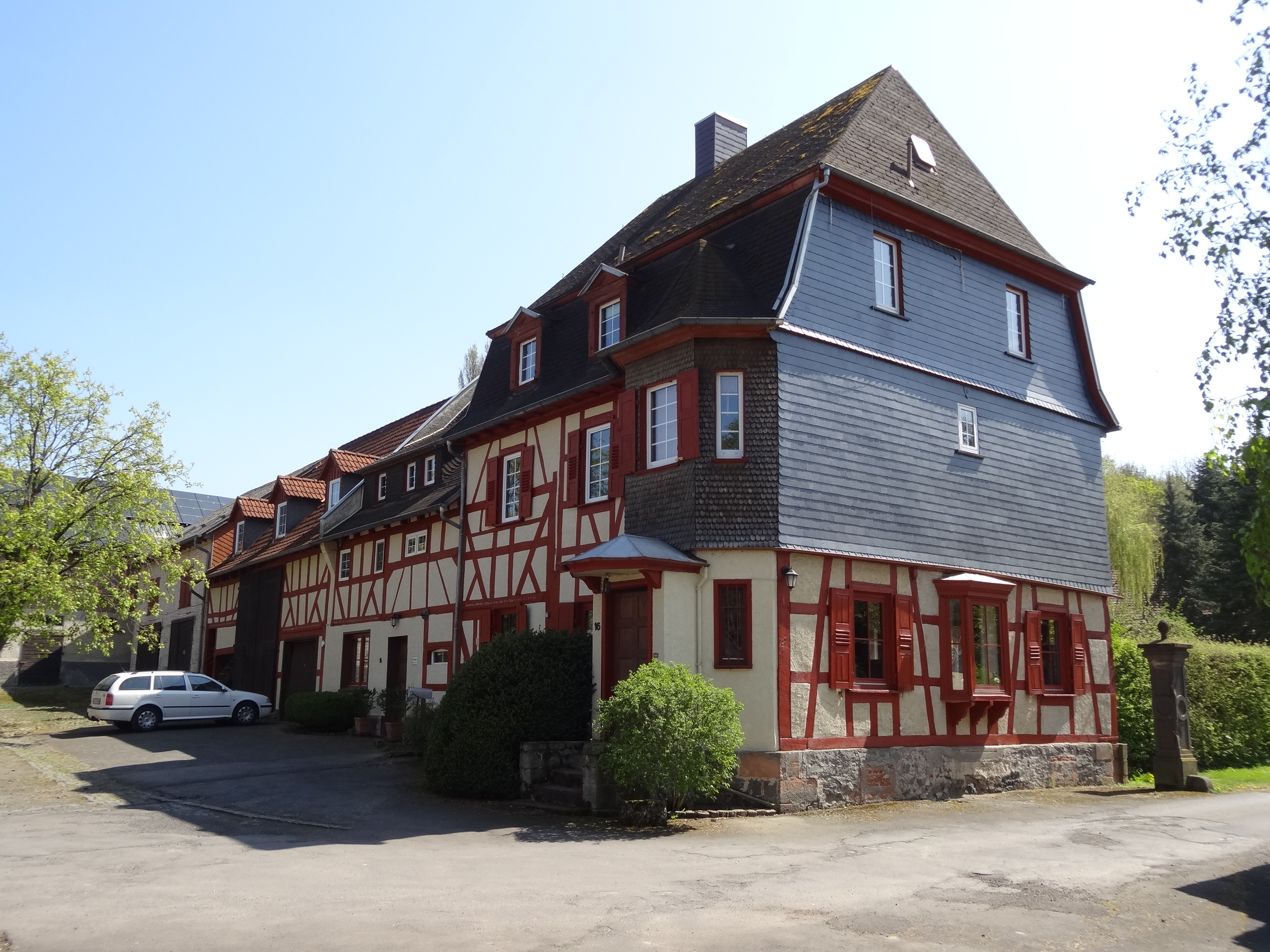 Neuhof (Leihgestern)